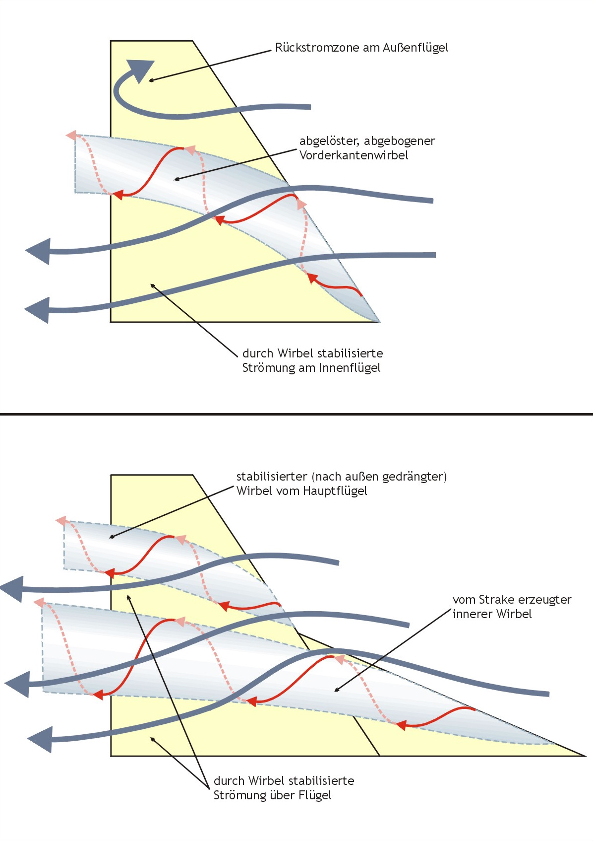 Strömung am Strake-(Hybrid)-Flügel. Das obere Bild stellt den abgelösten Vorderkantenwirbel am normalen Flügel ohne Strake dar. Das untere Bild stellt das Strömungssystem aus beiden Wirbeln am Strakeflügel dar. Der äußere Wirbel wird stabilisiert und liegt im äußeren Bereich des Flügels.